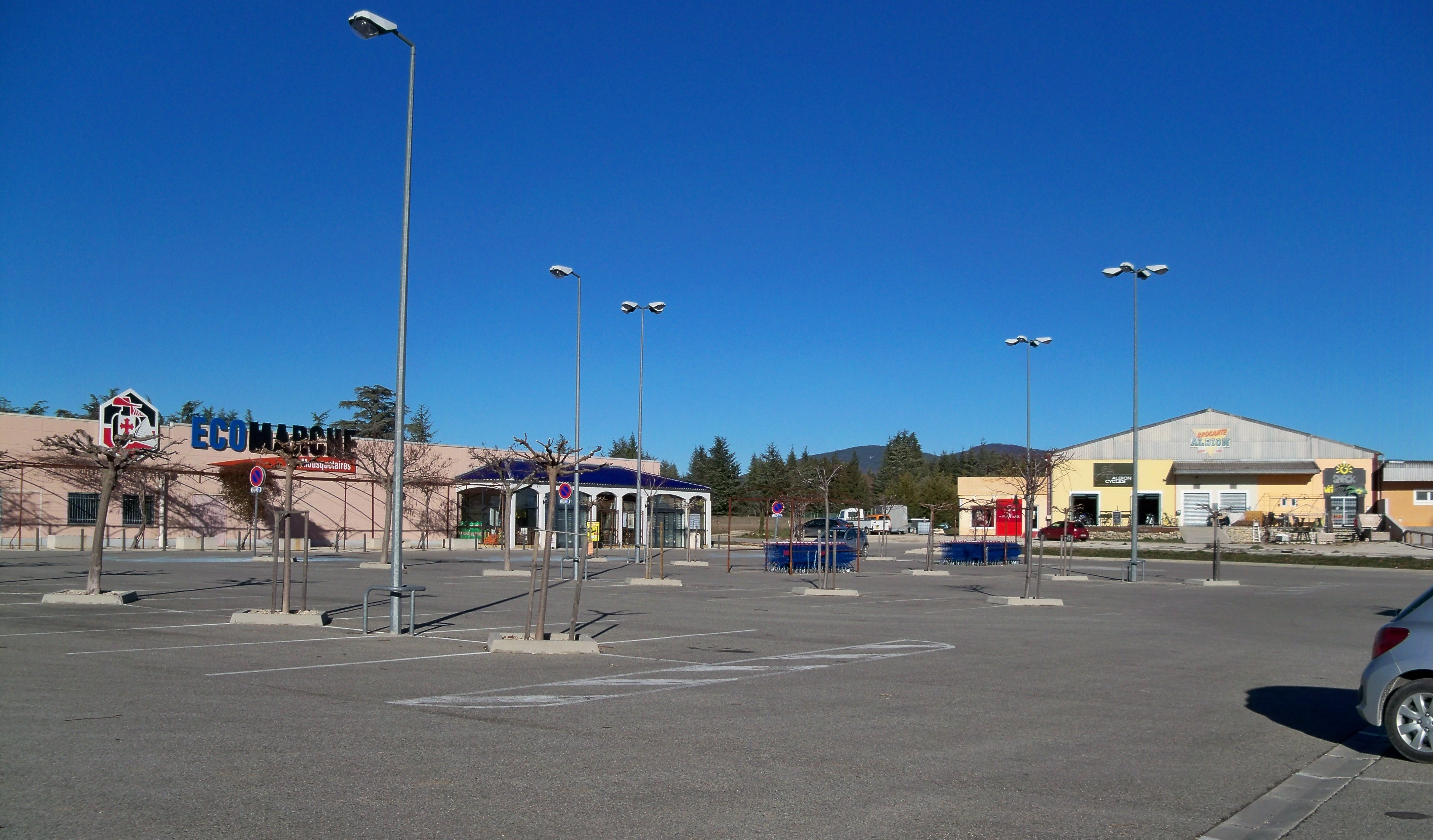 Zone commerciale de Sault (Vaucluse, France).